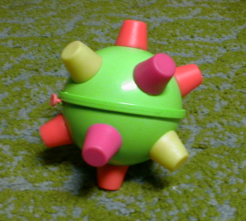 Bumble Ball, green.